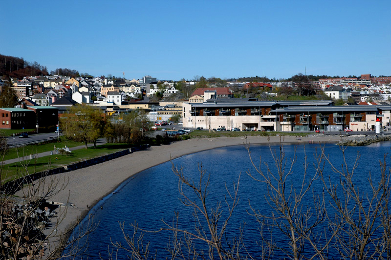 Batteristranda